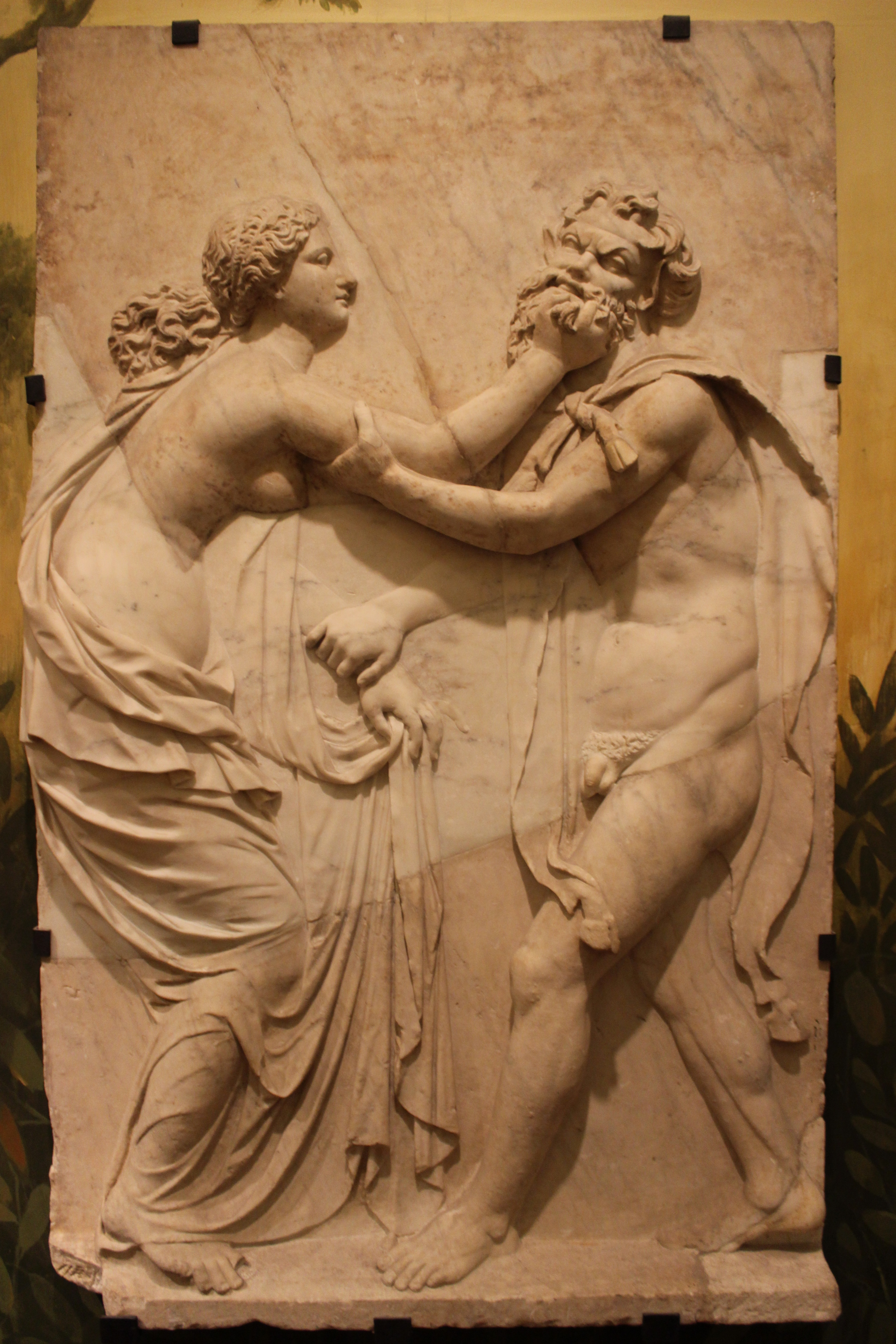 Nápoles. Secret Museum, Naples|Gabinetto Segreto . Sátiro y ninfa.